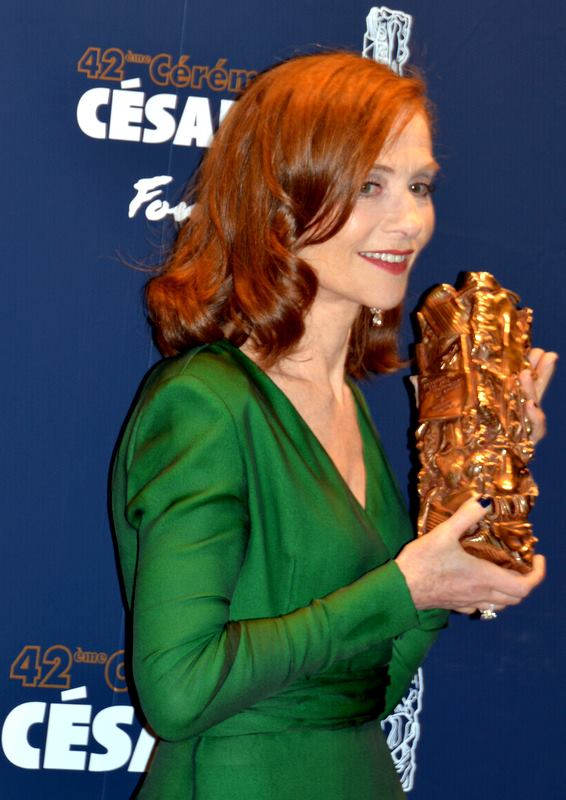 Isabelle Huppert à la cérémonie des César